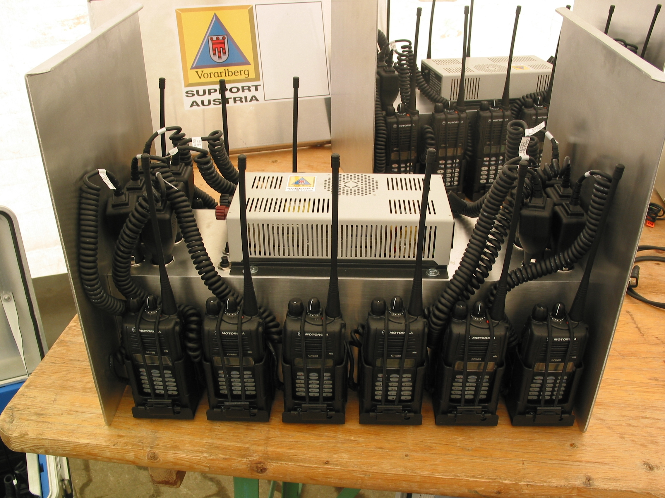 Handfunkgeräte der Support Unit Austria